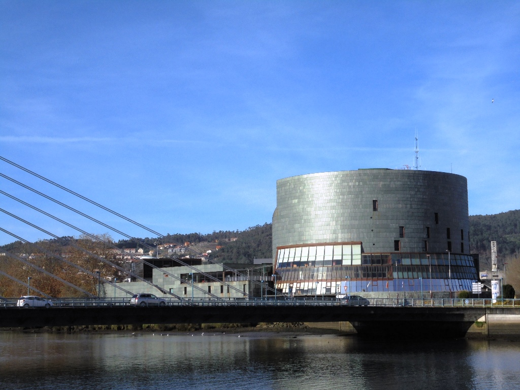 Palacio de Congresos y Exposiciones Pontevedra Capital